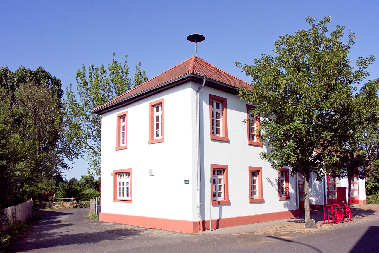 Ehemaliges Gemeindehaus in Petterweil, Karben im Wetteraukreis, Deutschland.